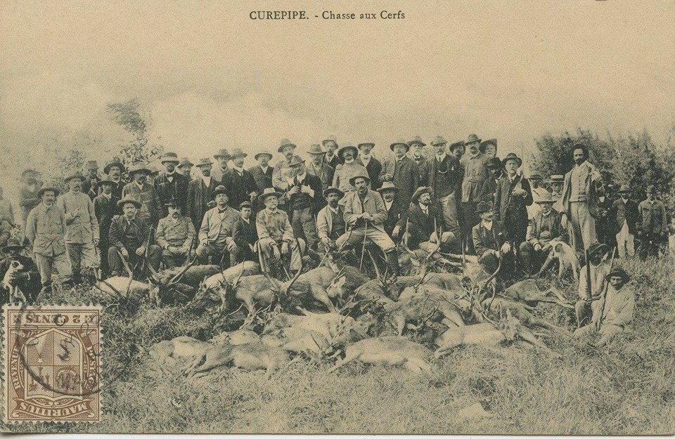 Curepipe vers 1900 : partie de chasse aux cerfs (de Java).